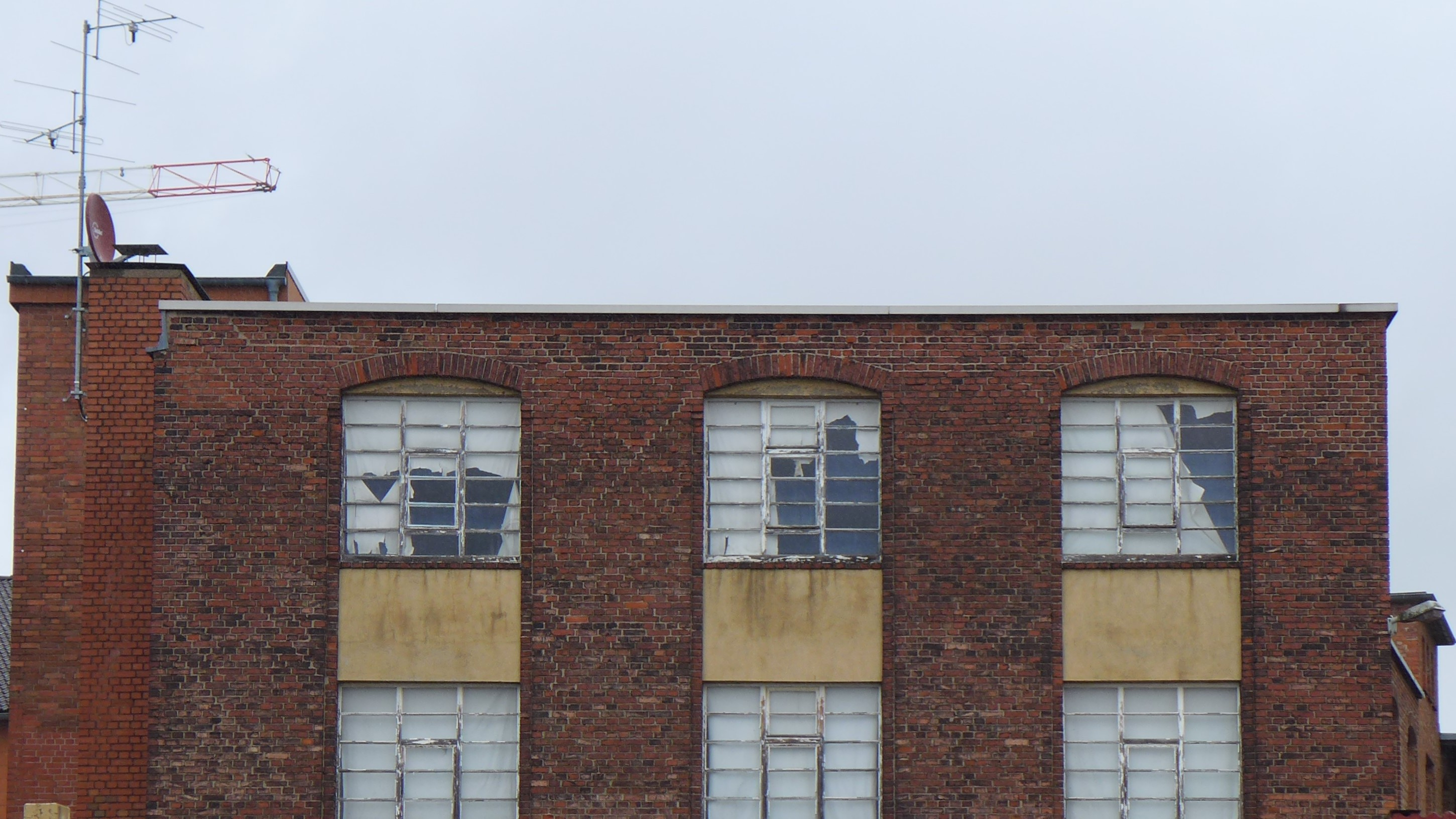 Detail Westseite